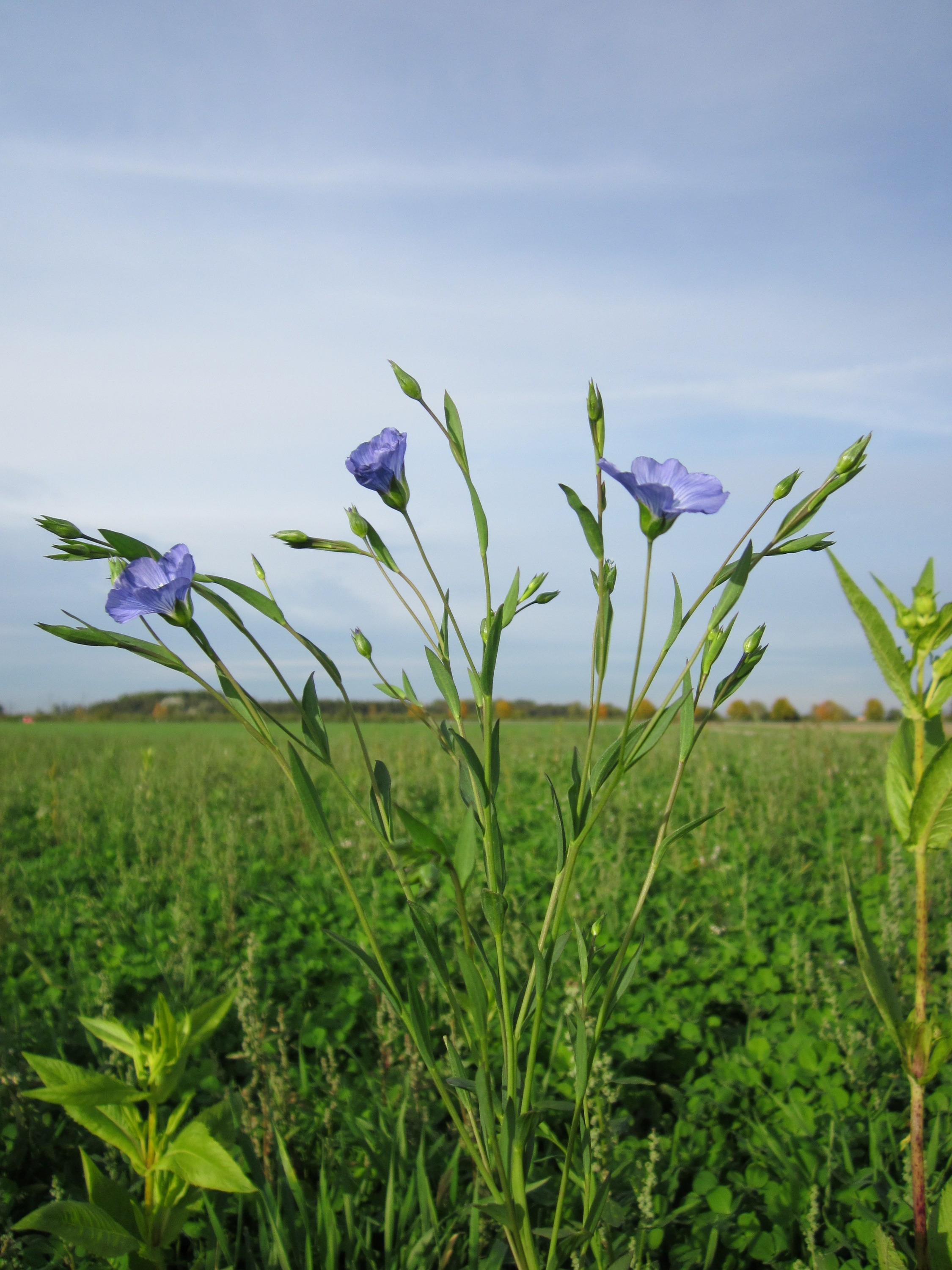 Gemeiner Lein (Linum usitatissimum) in einem Sonnenblumenfeld bei Neulußheim